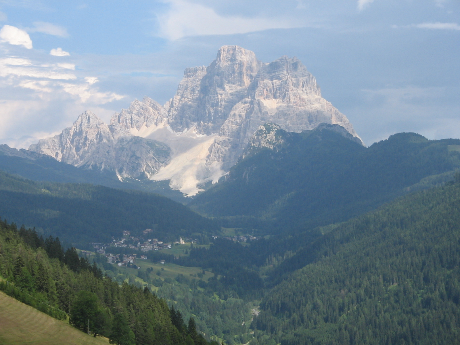 Monte Pelmo viewed from val Fiorentina, Dolomiti , Italy